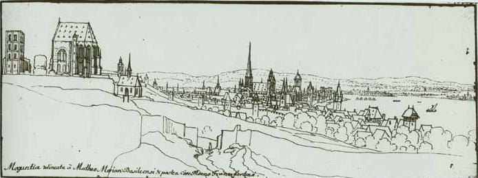 Mainz von Südosten aus gesehen, vor Dezember 1631. Federzeichnung von Wenzel Hollar. Blick vom Michelsberg auf St. Alban und die Stadt samt Vorstadt "Vilzbach" und den Rhein. Der Dom trägt den hohen gotischen Helm auf dem Westturm, das gotische Geschoss mit der späteren Laterne auf der Ostgruppe. Rechts vom Dom St. Maria ad Gradus, davor der mittelalterliche Vorgängerbau der Ignazkirche mit gotischem Doppelturm. Gut erkennbar auch der dem Holzturm baugleiche Zollturm.